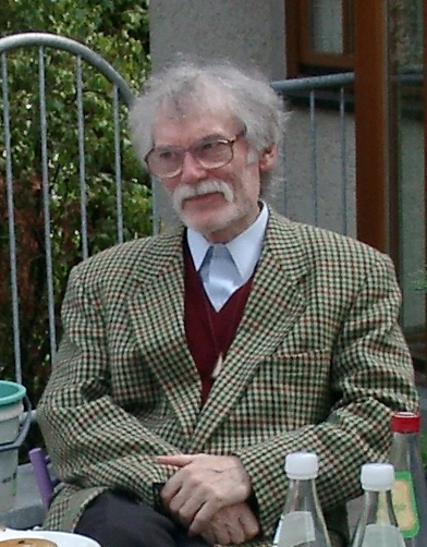 Portrait des Malers Fritz Genkinger